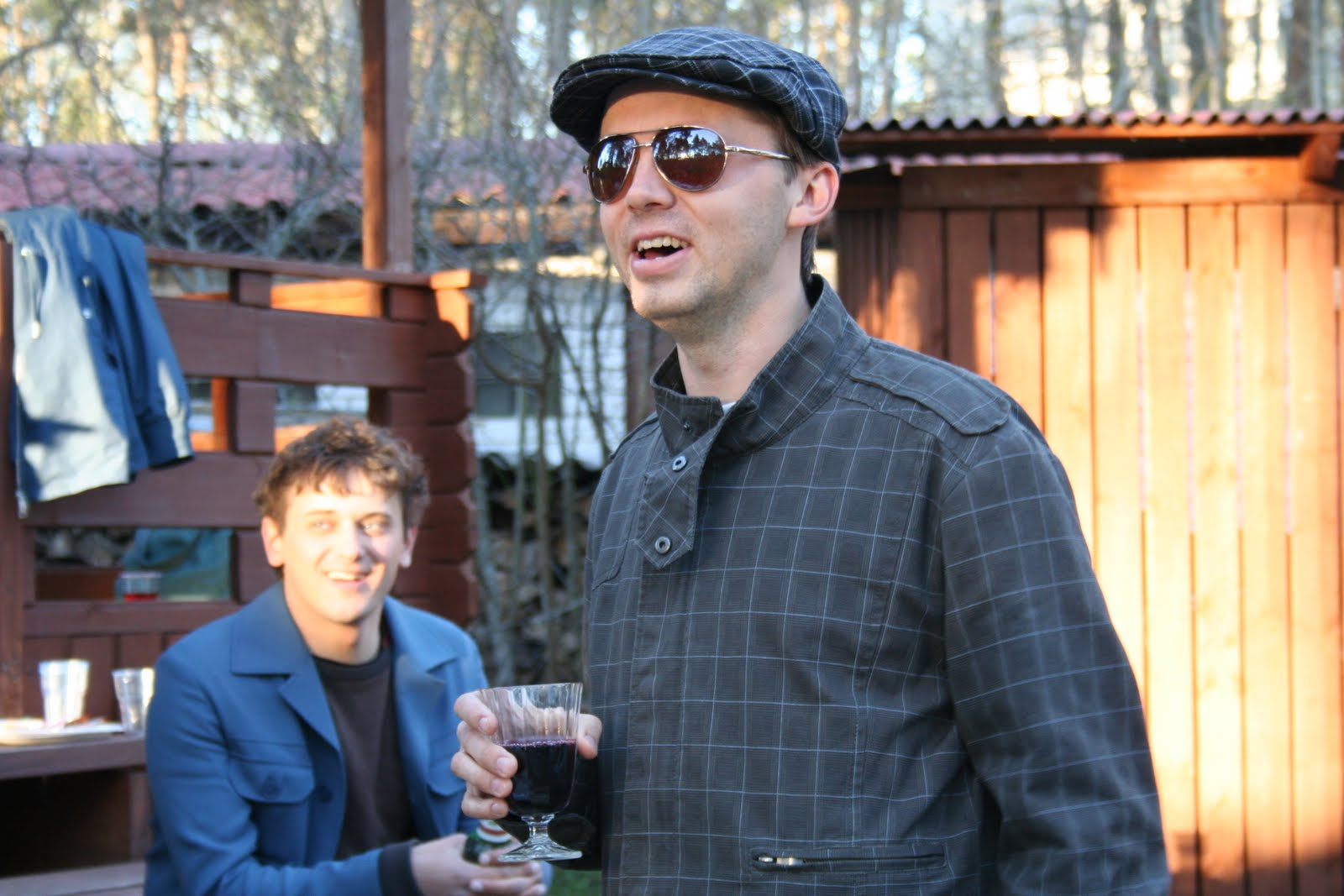 Argo Aadli (esiplaanil) ja Robert Annus lastesaate "Saame kokku Tomi juures" viimase osa võttepäeval.